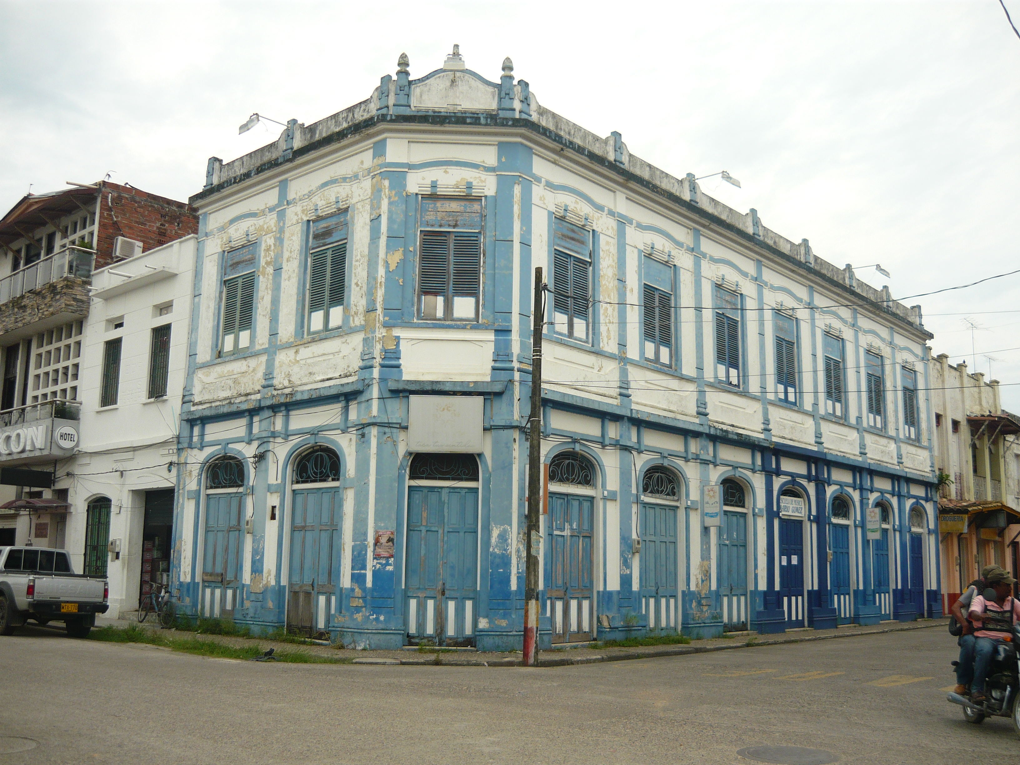 Escuela de Música Mario Gomez